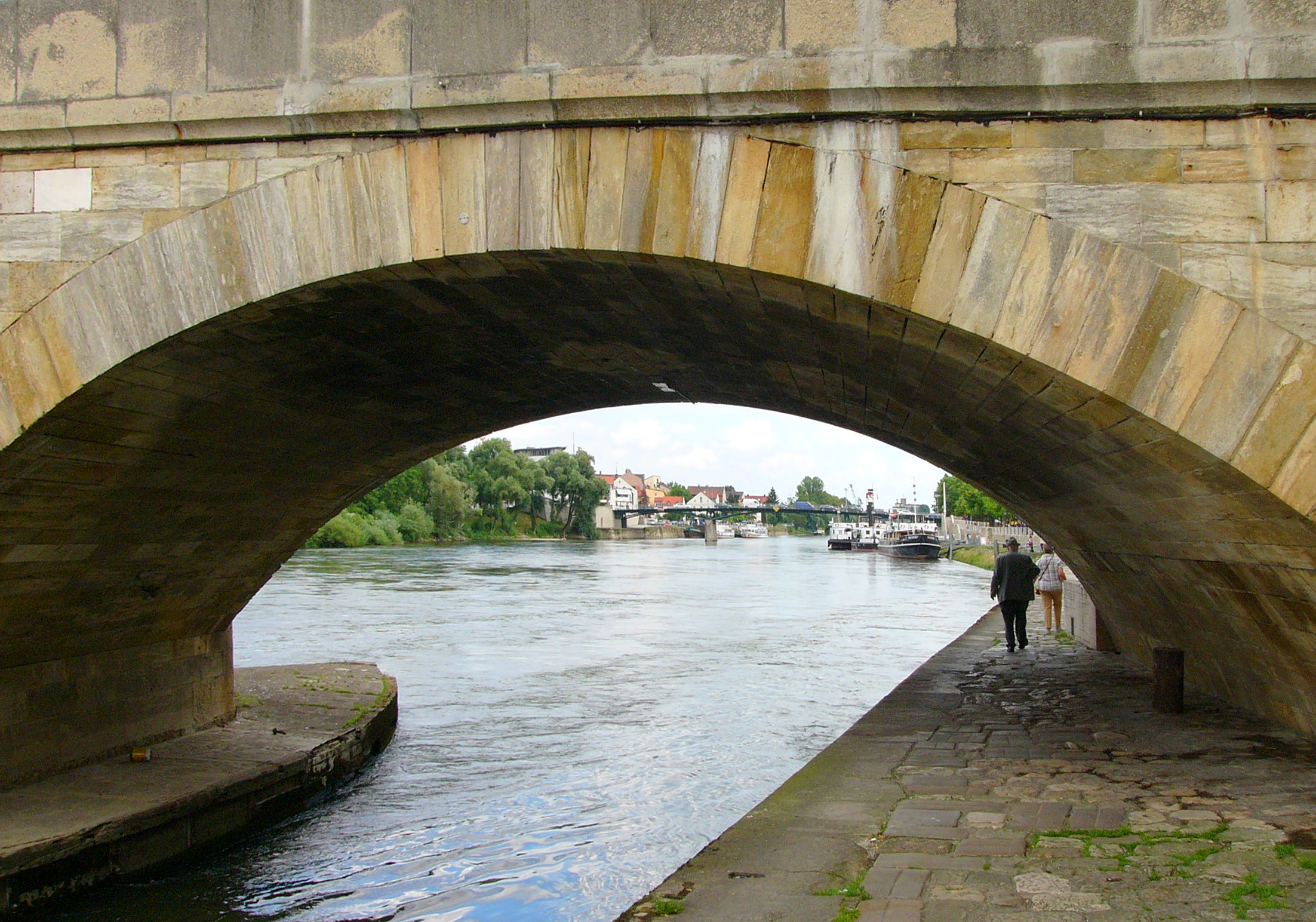 Steinerne Brücke, Regensburg, Germany